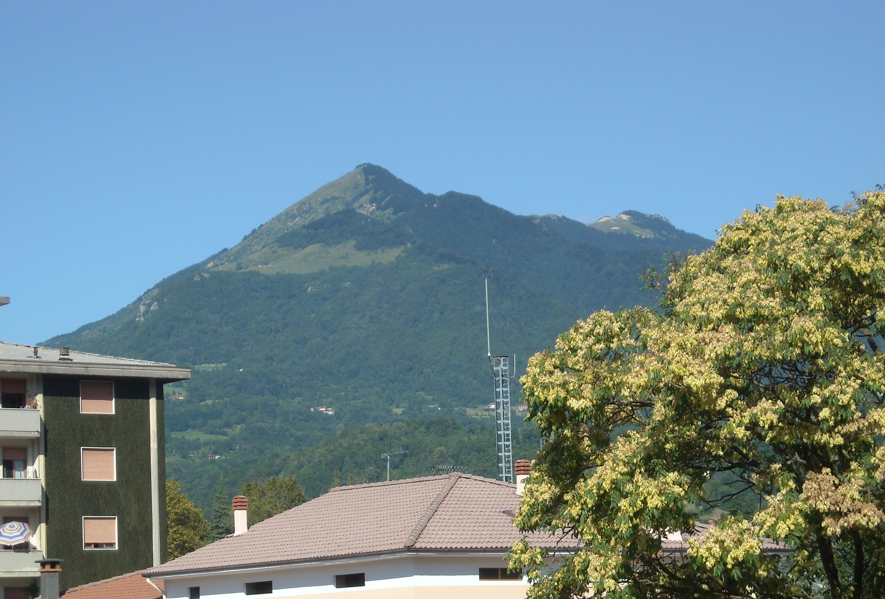 Vista di Marana dal quartiere Ponte dei Nori di Valdagno